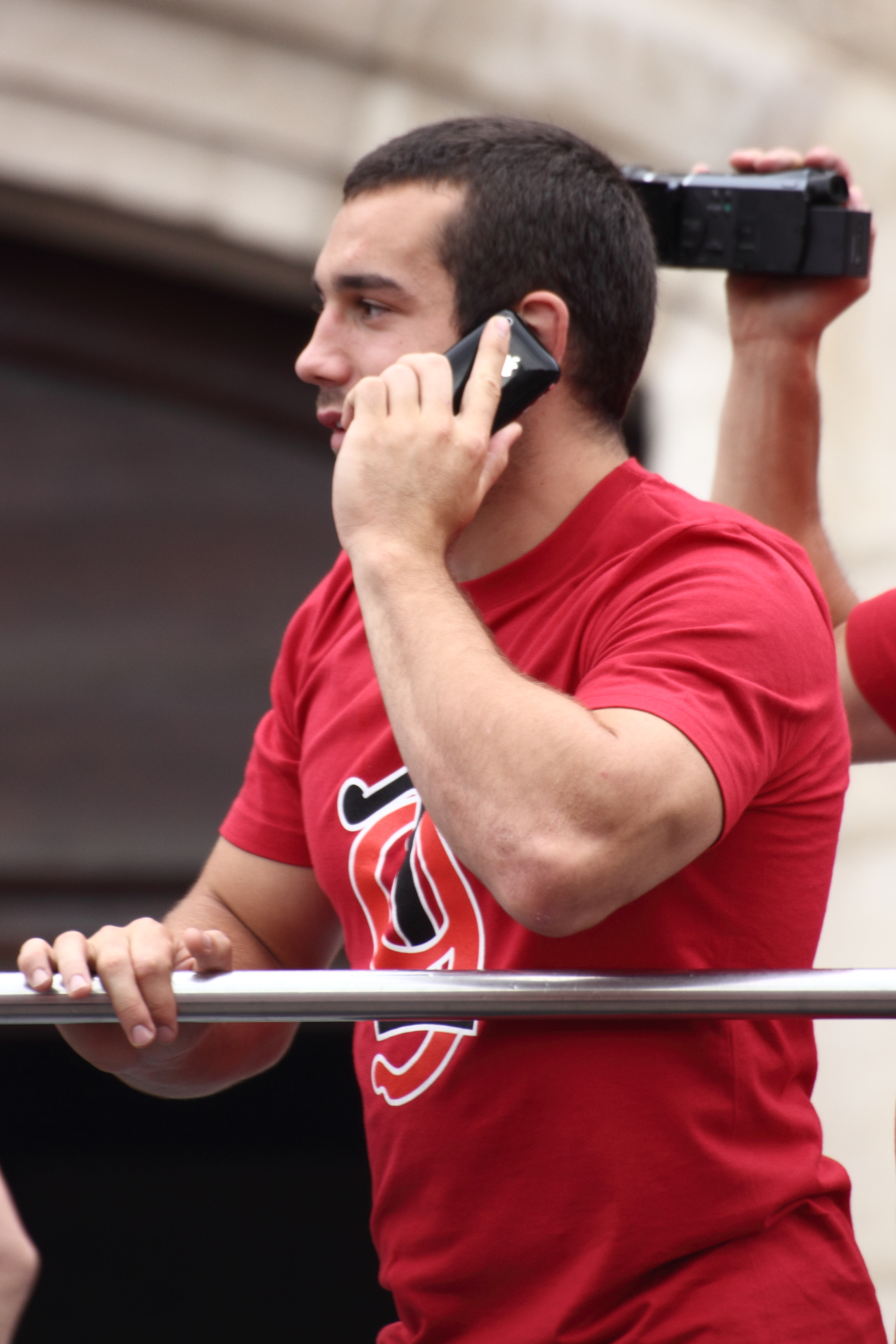 Jean-Marc Doussain téléphonant